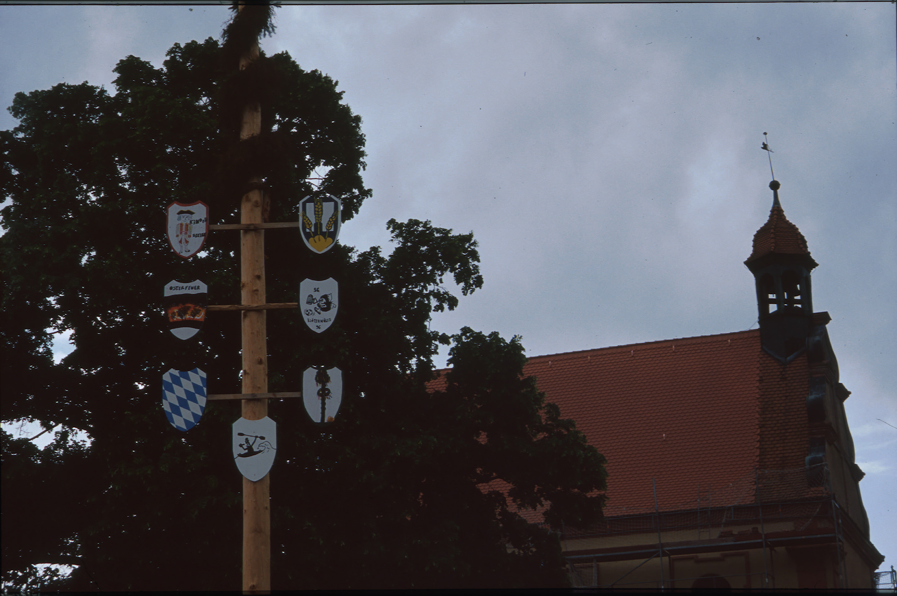 bei St. Ulrich